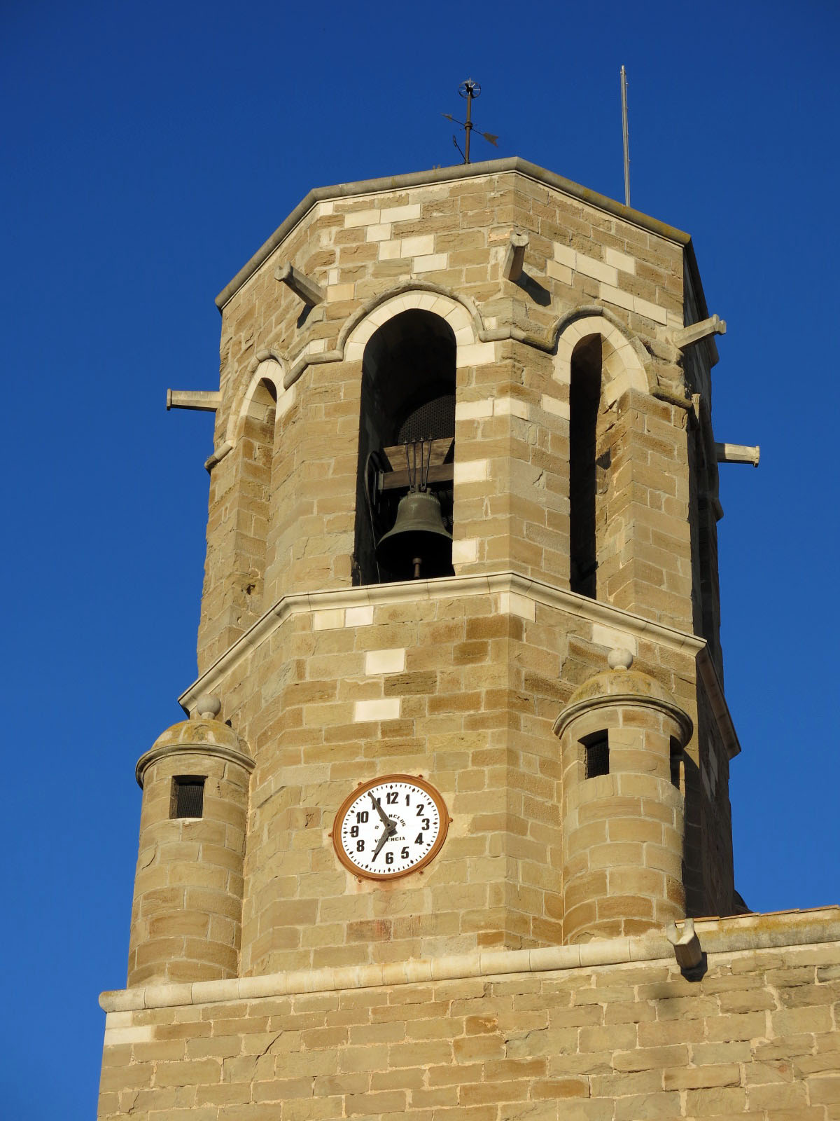 Església parroquial de Santa Maria (Linyola) Object location41° 42′ 38.59″ N, 0° 54′ 18.14″ E